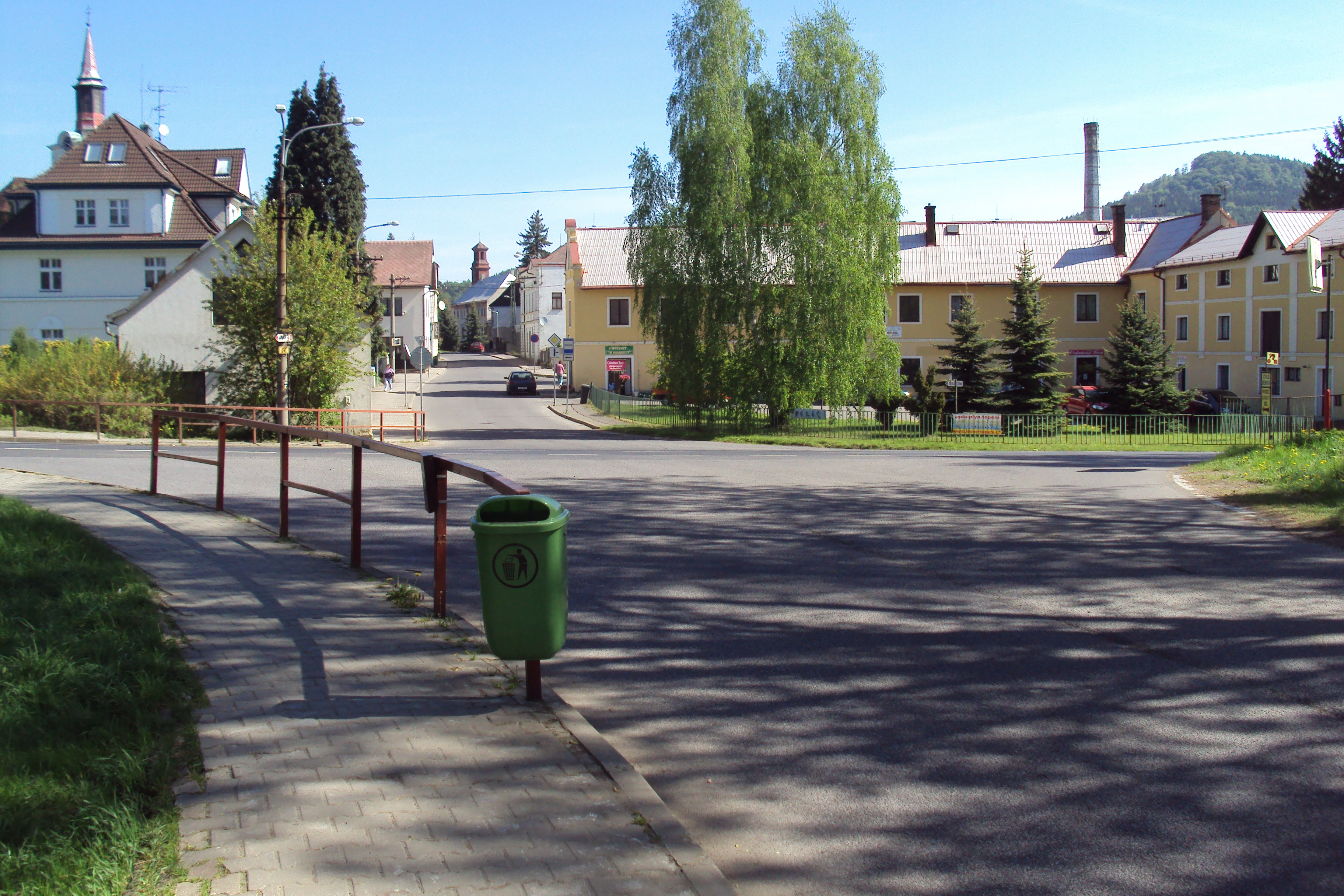 Křižovatka E442 s ul.Československé armády ve Cvikově